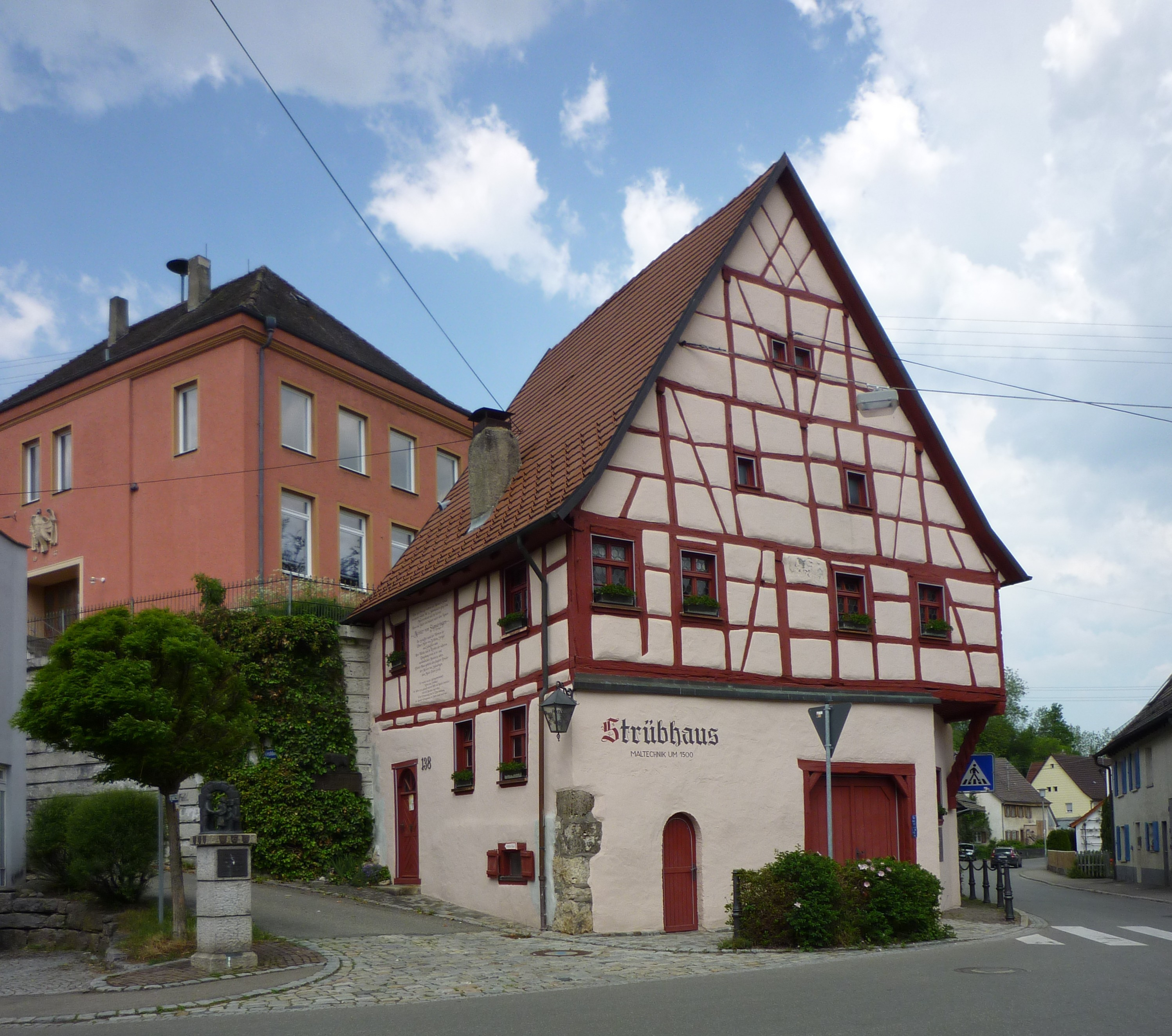 Veringenstadt - Strübhaus um 1500, Fachwerk